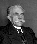 Sebastião de Magalhães Lima, no início do séc. XX.